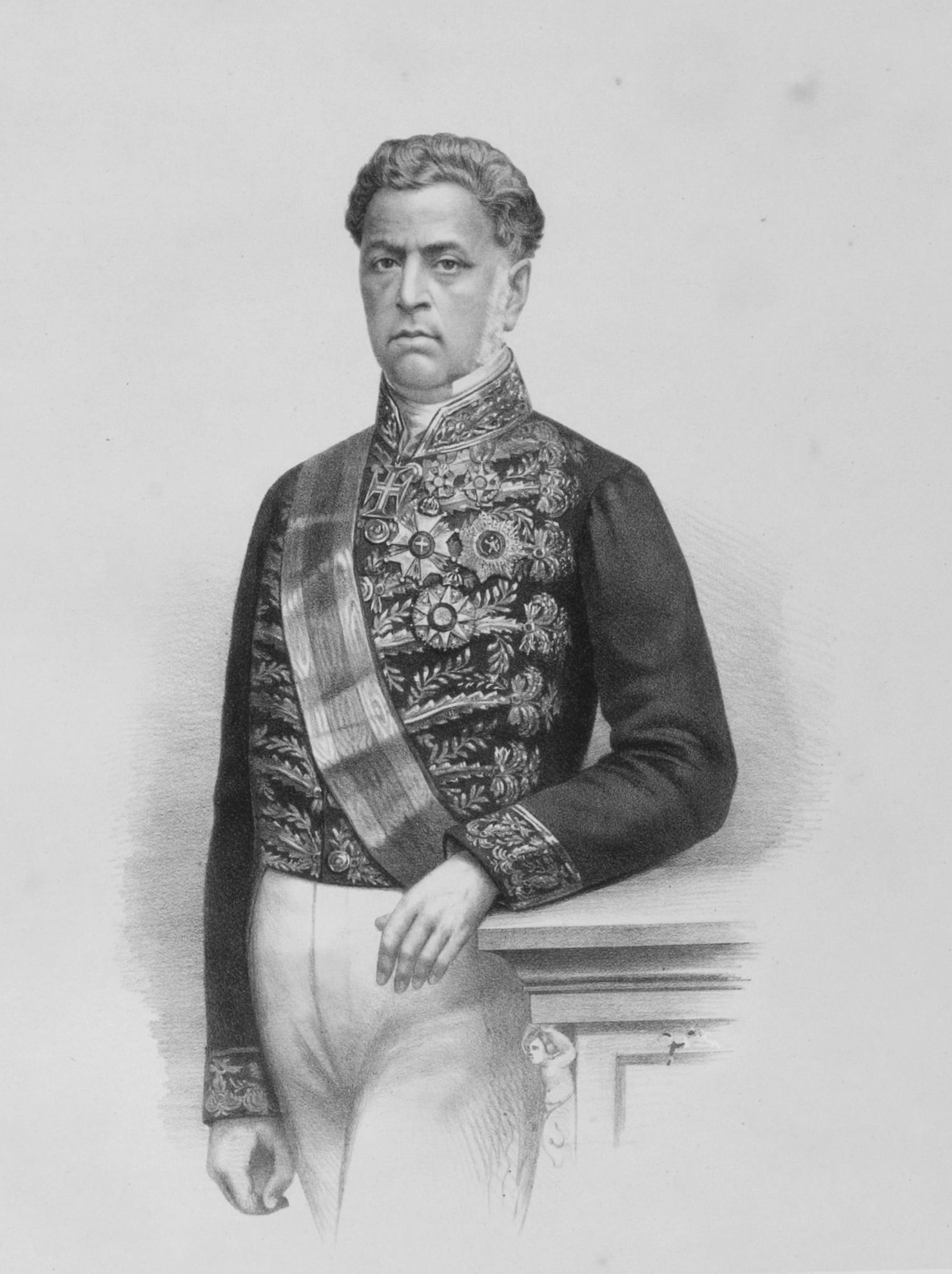 Aureliano de Sousa e Oliveira Coutinho, o Visconde de Sepetiba.